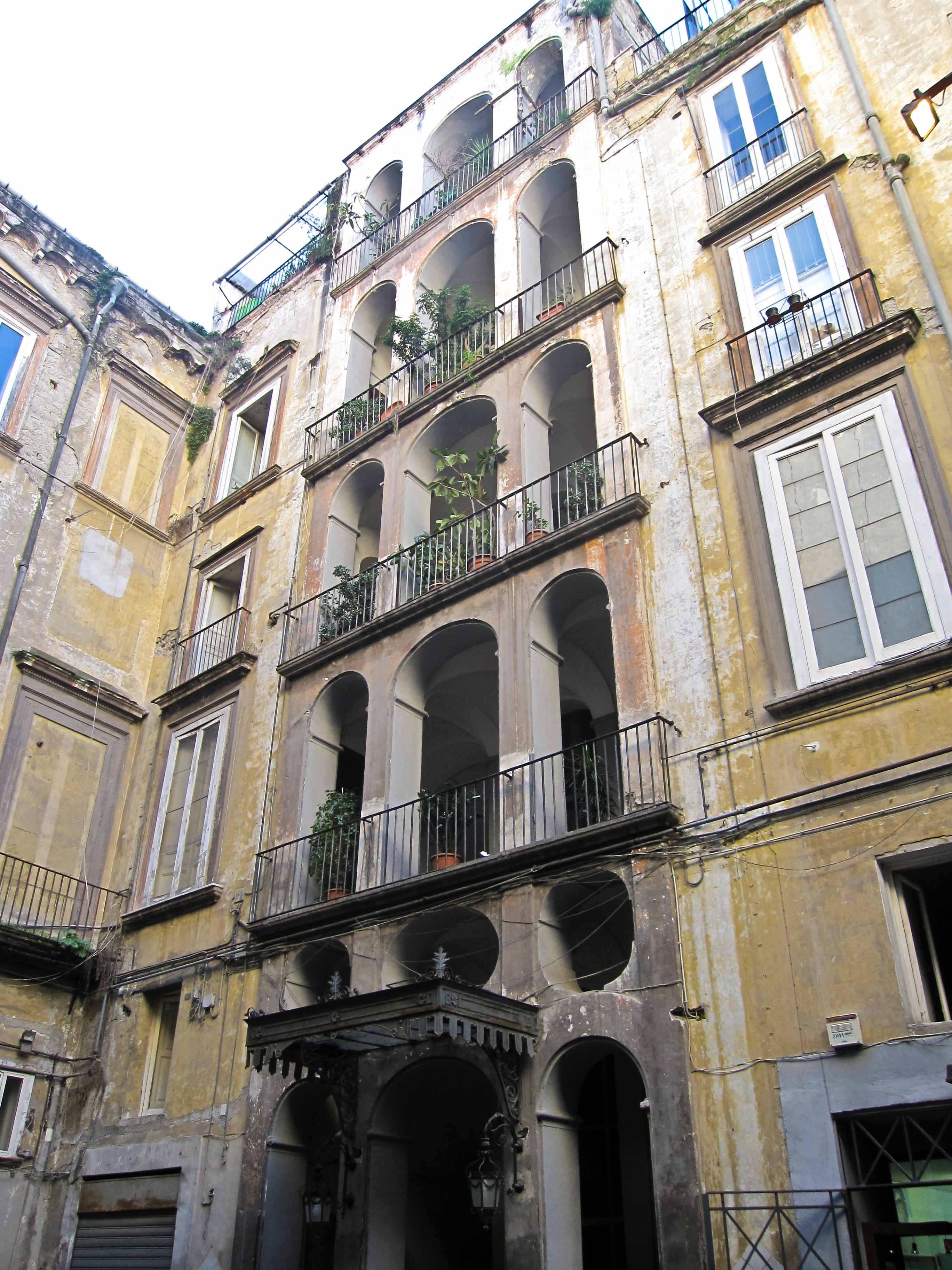 Il corpo principale del palazzo Venezia - Napoli